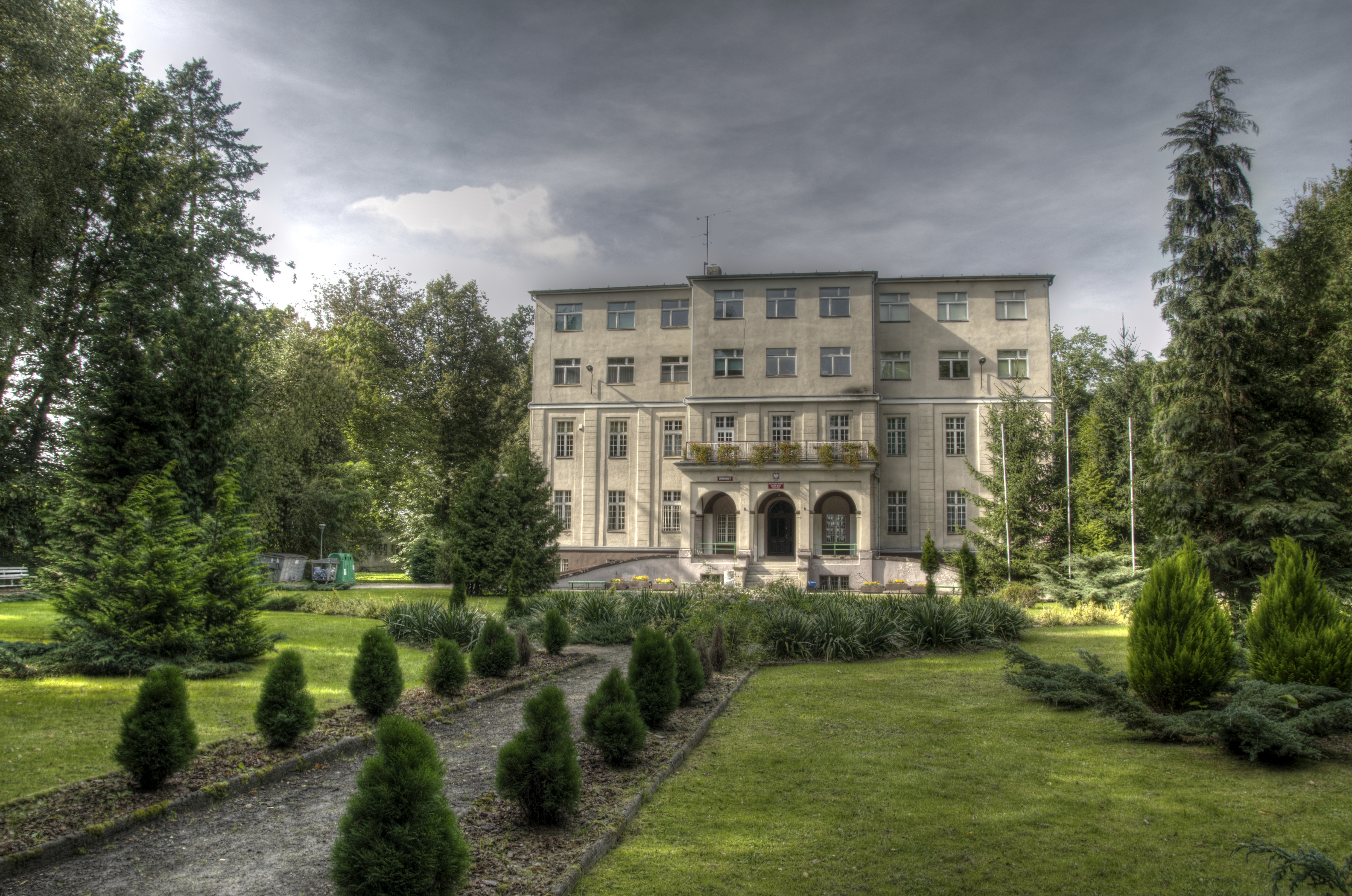 dwór z 2. poł. XVIII w. Stary Tomyśl, Nowy Tomyśl